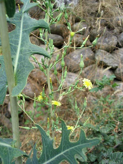 Original description: Lactuca serriola (laitue scariole, laitue sauvage) Photo prise à Ille-sur-Têt en juillet 2004